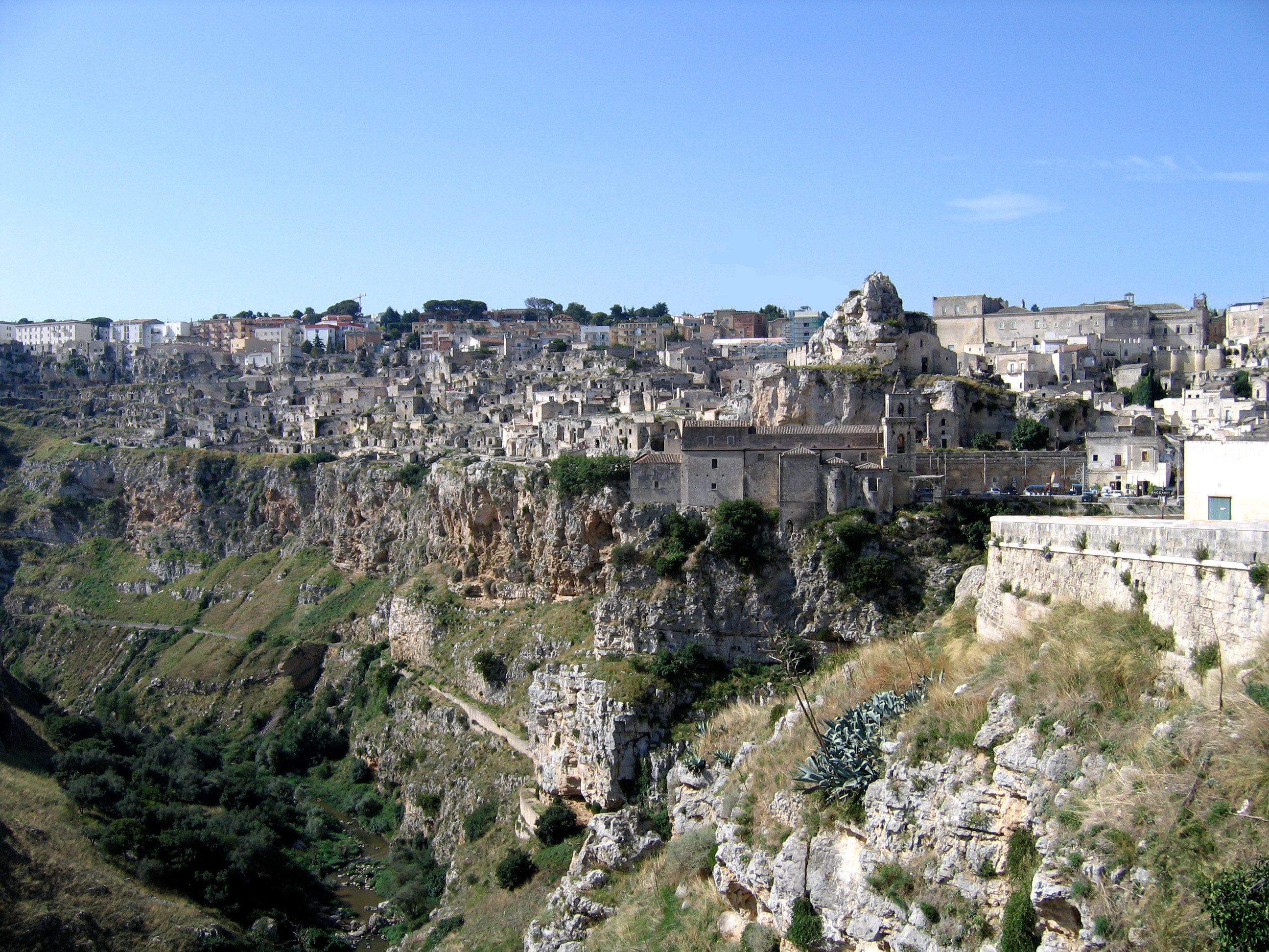 Vue d'ensemble du site de Matera et de ses habitations troglodytes source : photo de vacances Dominique grassigli